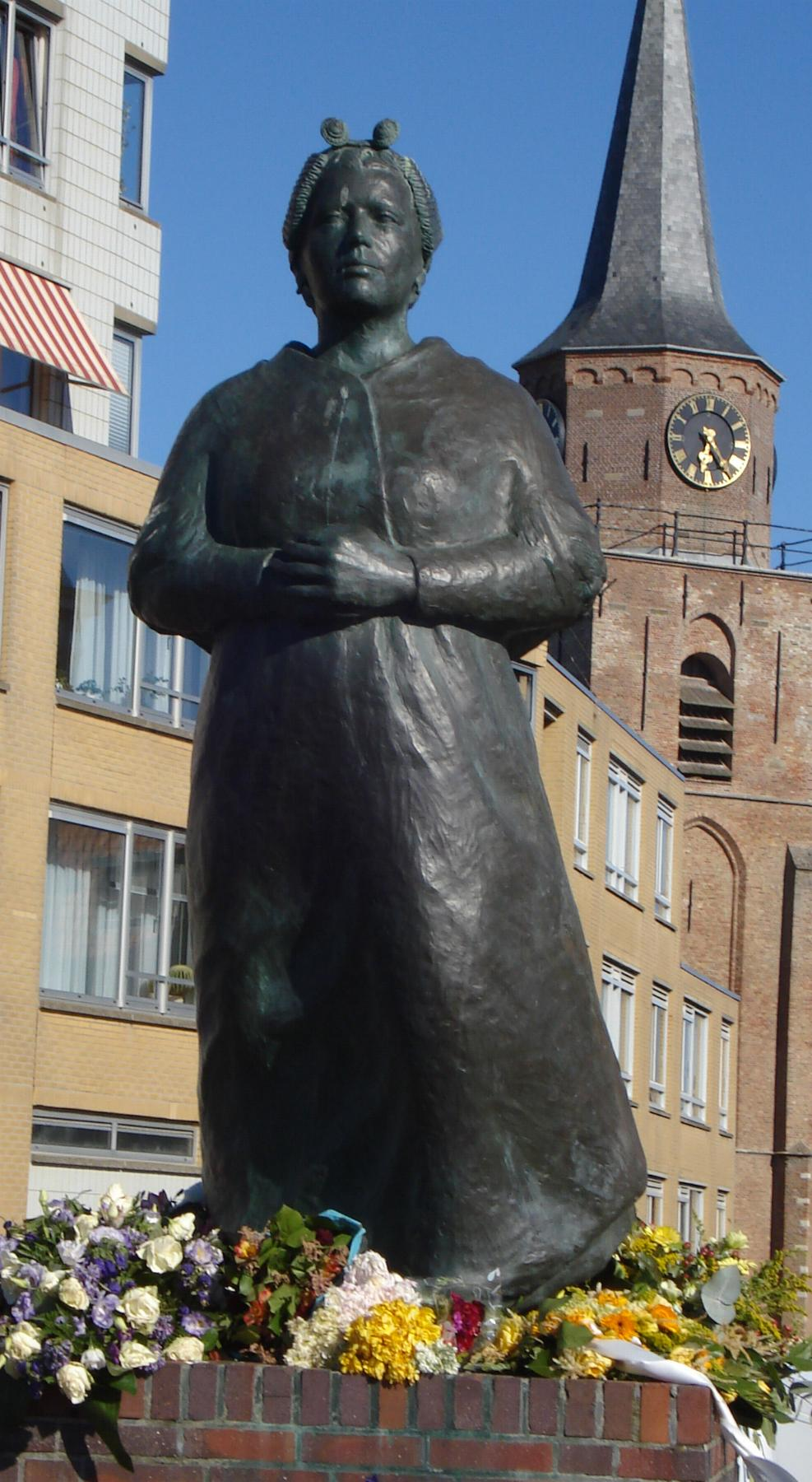 Den Haag, Strandweg. Vissermonument van Gerard Bakker & Cees van Harmelen. The Hague/The Netherlands.